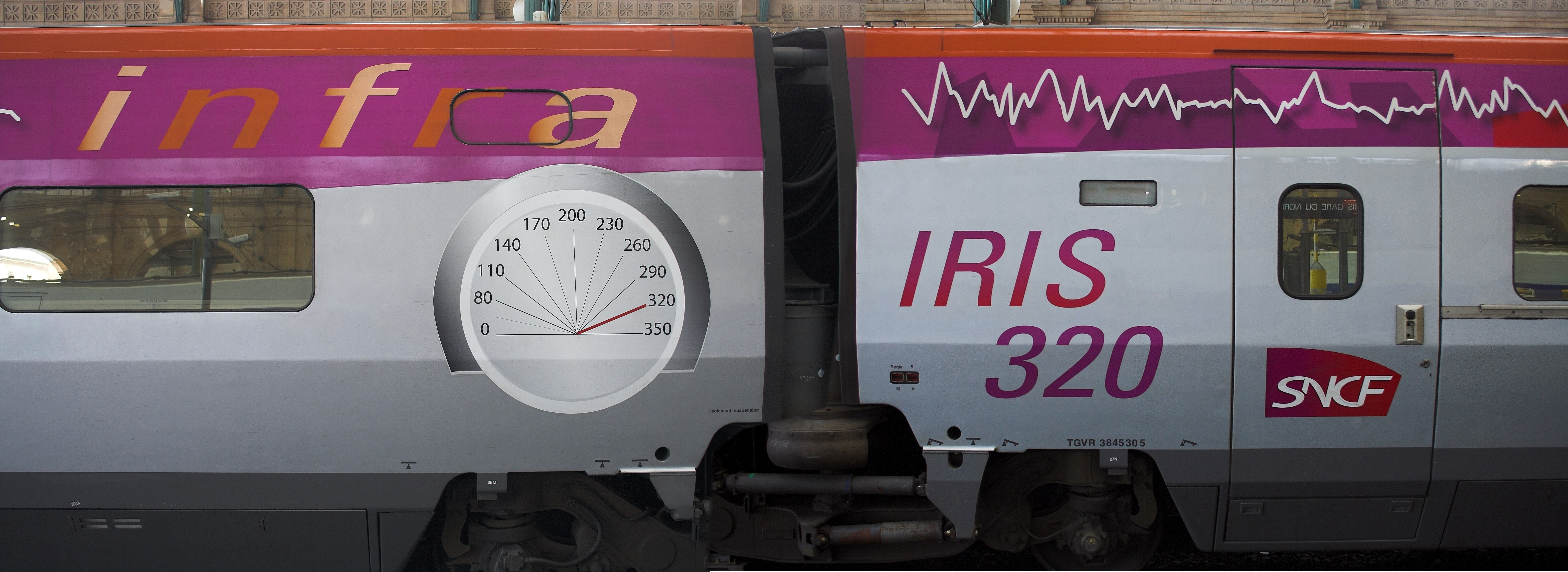 IRIS 320(Gare du Nord, France)